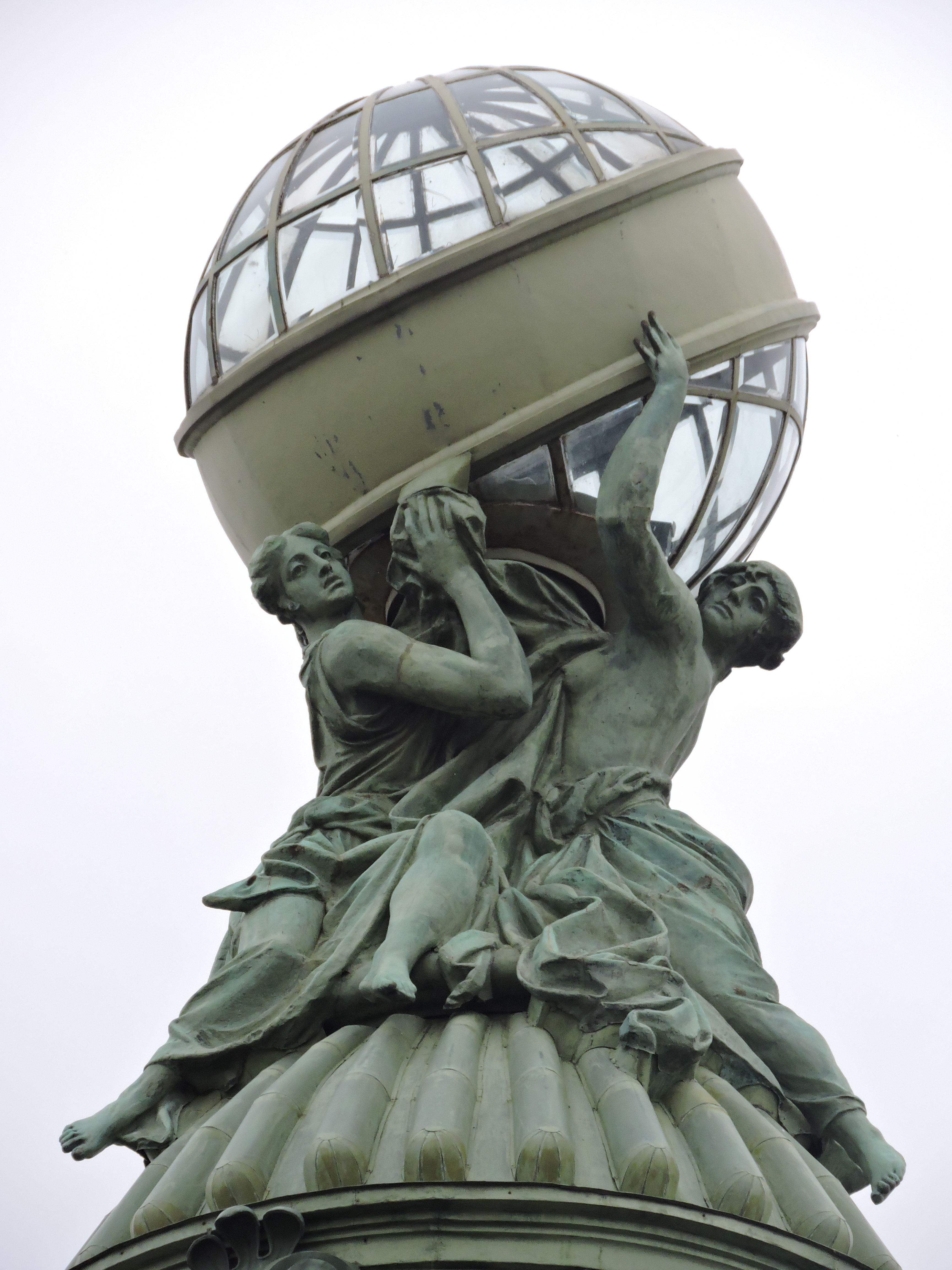 Глобус на Доме Книги